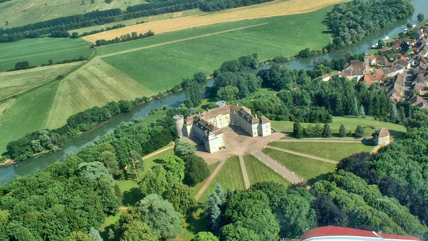 Vue aérienne du château de Ray-Sur-Saône.